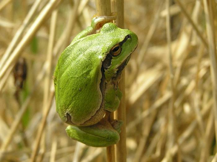 Rzekotka drzewna